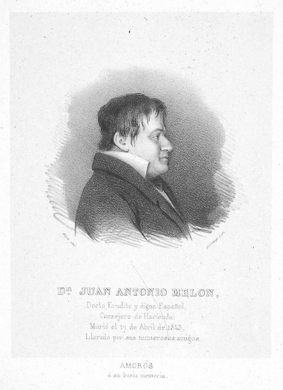 Juan Antonio Melón. Litografía firmada Goya del. Gilliang Lith. Inscripción: D.n JUAN ANTONIO MELON, / Docto, Erudito y digno Español / Consejero de Hacienda / Murió el 17 de abril de 1843 / Llorado por sus numerosos amigos / AMORÓS / á su buena memoria. Biblioteca Nacional de España